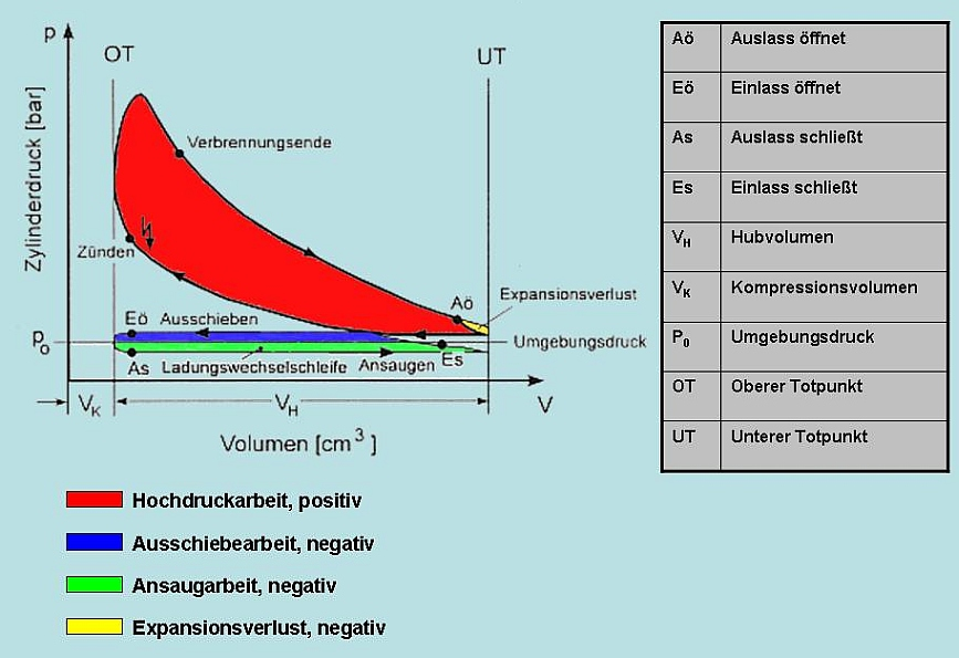 Motorprozess eines Viertaktmotors, schematisch als p-V-Diagramm dargestellt